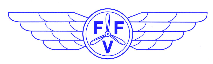 Skolans logotype